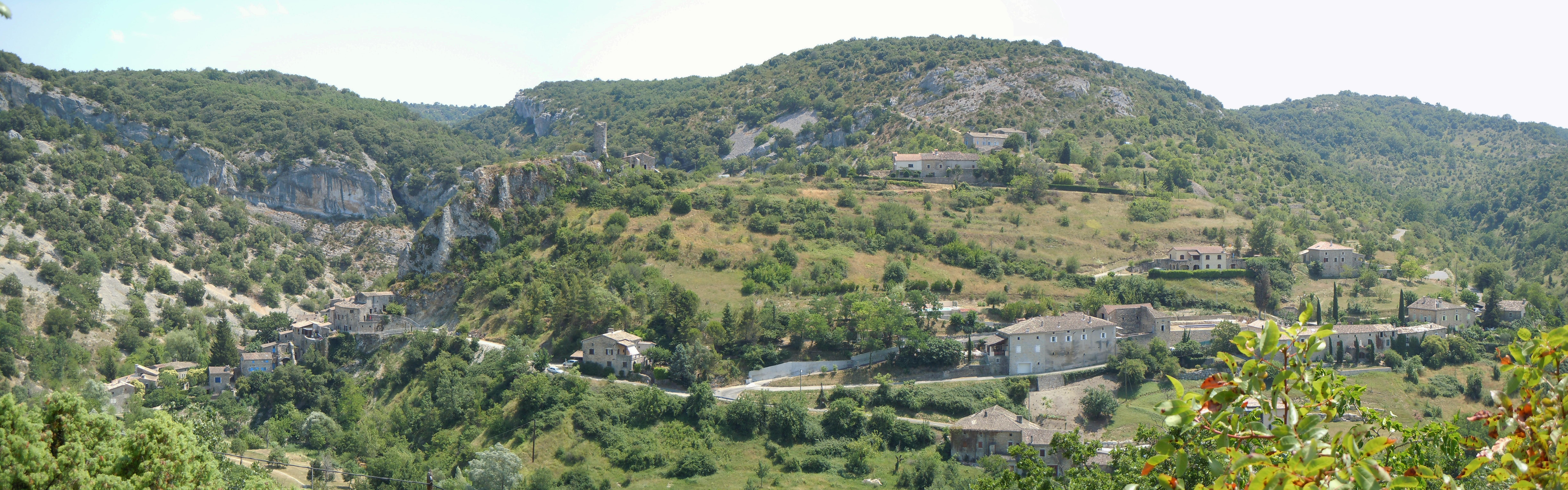 Rochecolombe vue panoramique